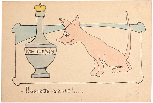 Конституция. Рисованная открытка. Автор: Валерий Каррик (1900 год).